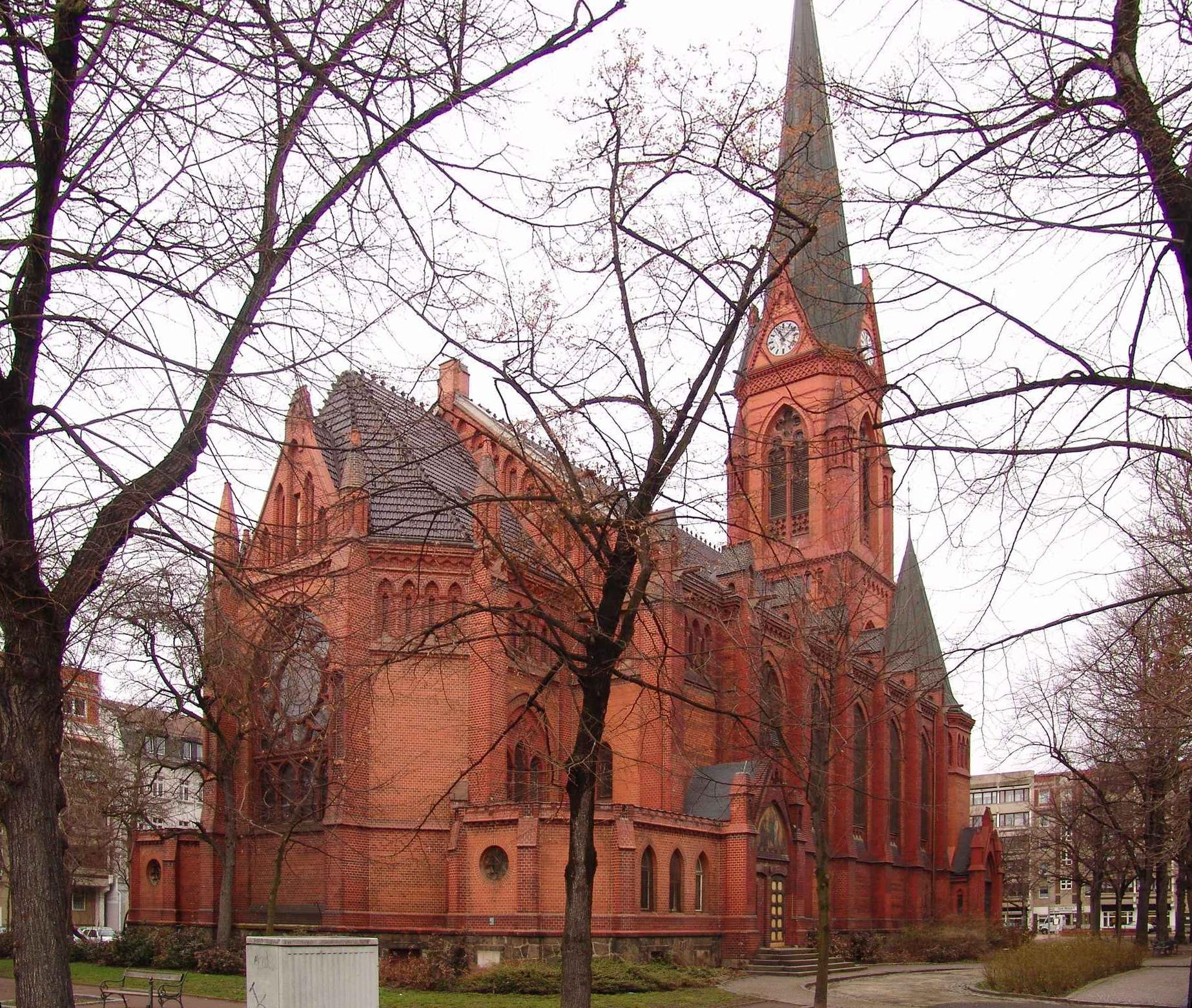 Südostseite der Lukaskirche in Leipzig-Volkmarsdorf